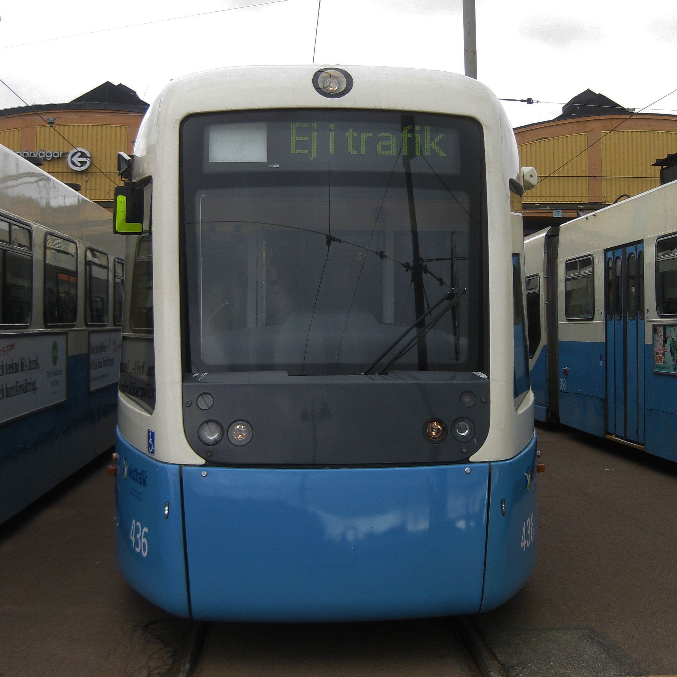 Spårvagn 436 av typen M32 (Sirio) utanför Vagnhallen Majorna i Göteborg.